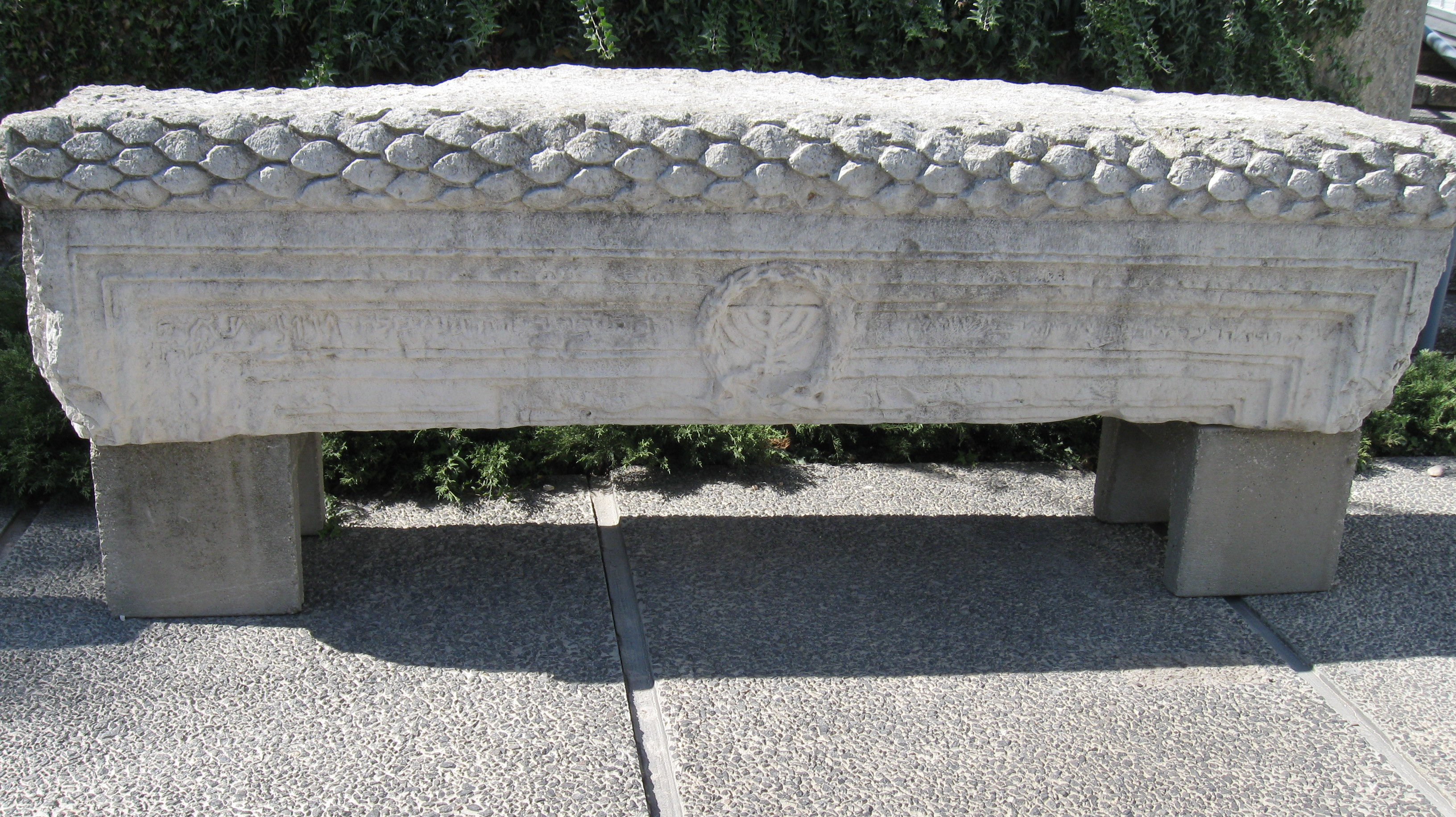 משקוף בית הכנסת בנדבוריה רישיון נוצר על ידי משתמש:Daniel Ventura